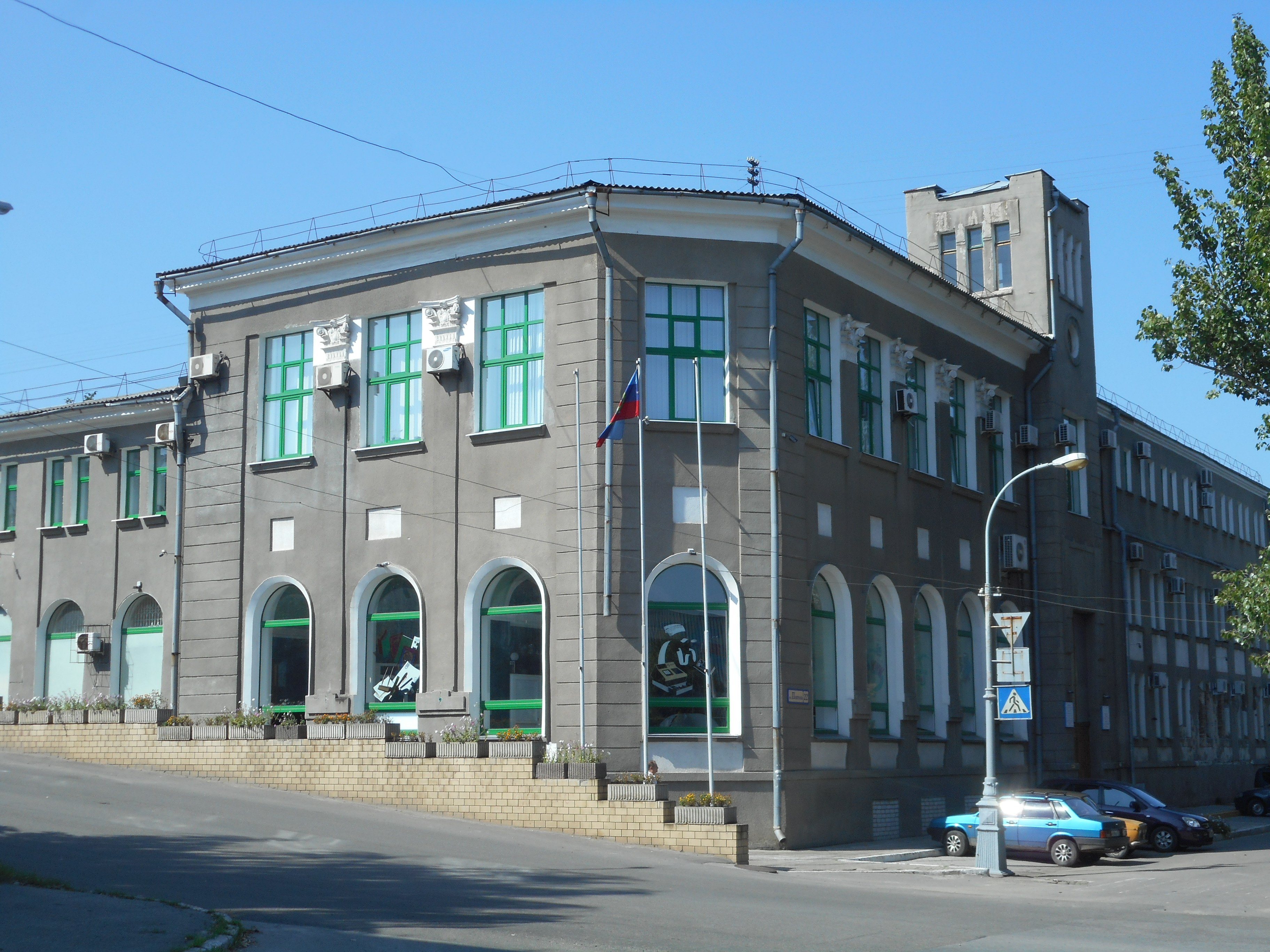 Административное здание ГУП ЛНР "Почта ЛНР", по адресу: ул. Почтовая, 22